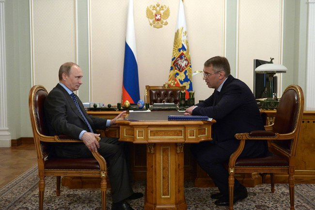 Встреча с исполняющим обязанности губернатора Ненецкого автономного округа Игорем Кошиным